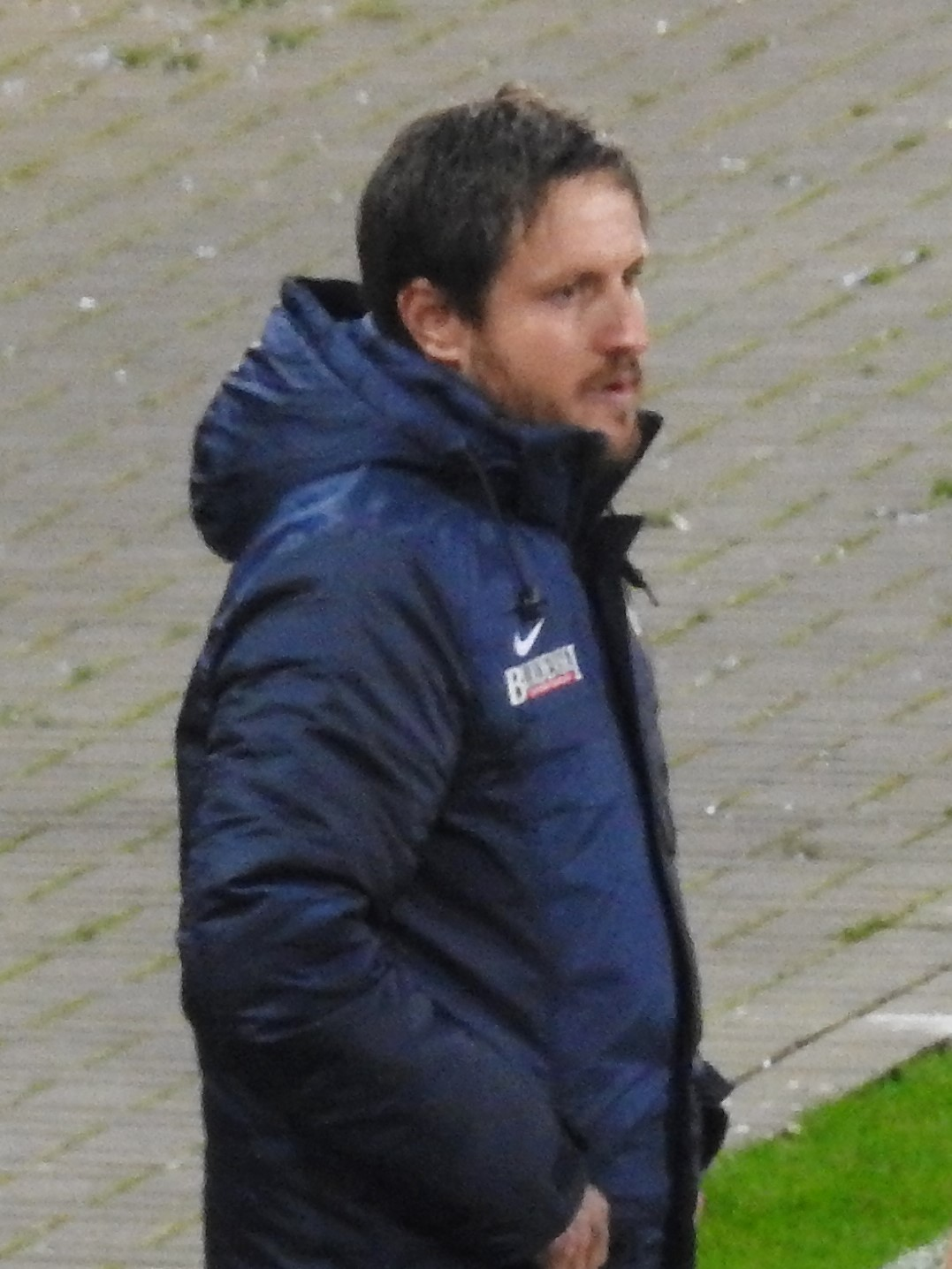 Drews, Hannes Trainer Aue 17-18